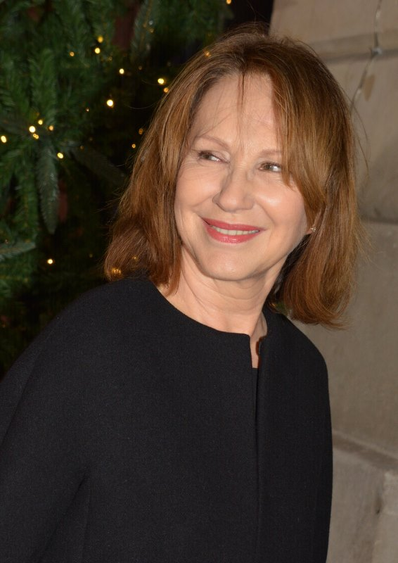 Nathalie Baye au dîner des révélations des César du cinéma